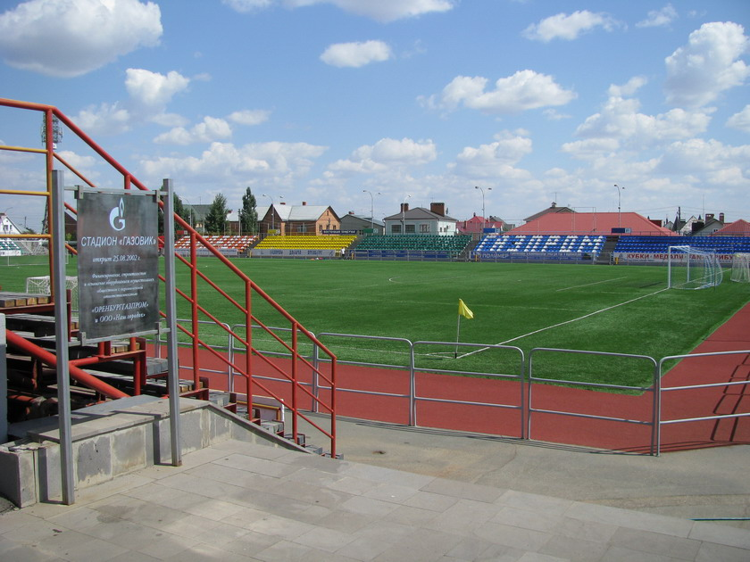 Стадион в мкрн. Ростоши г. Оренбург